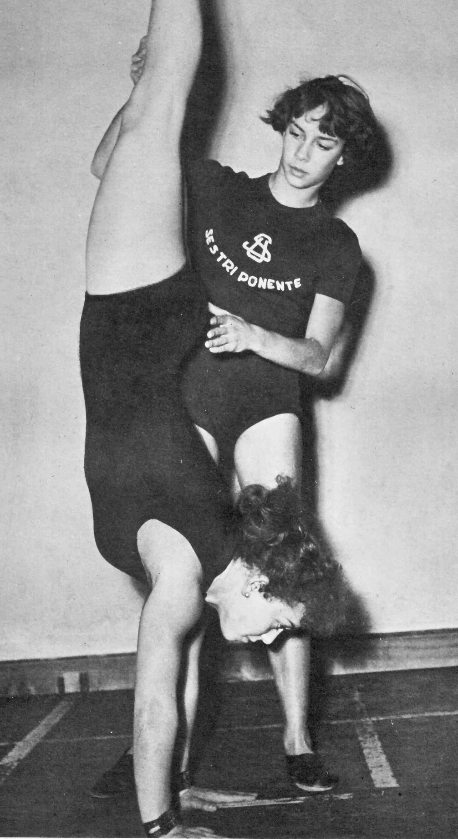 Anno 1956: le sorelle Luciana e Wilma Lagorara, campionesse di ginnastica artistica di fama nazionale